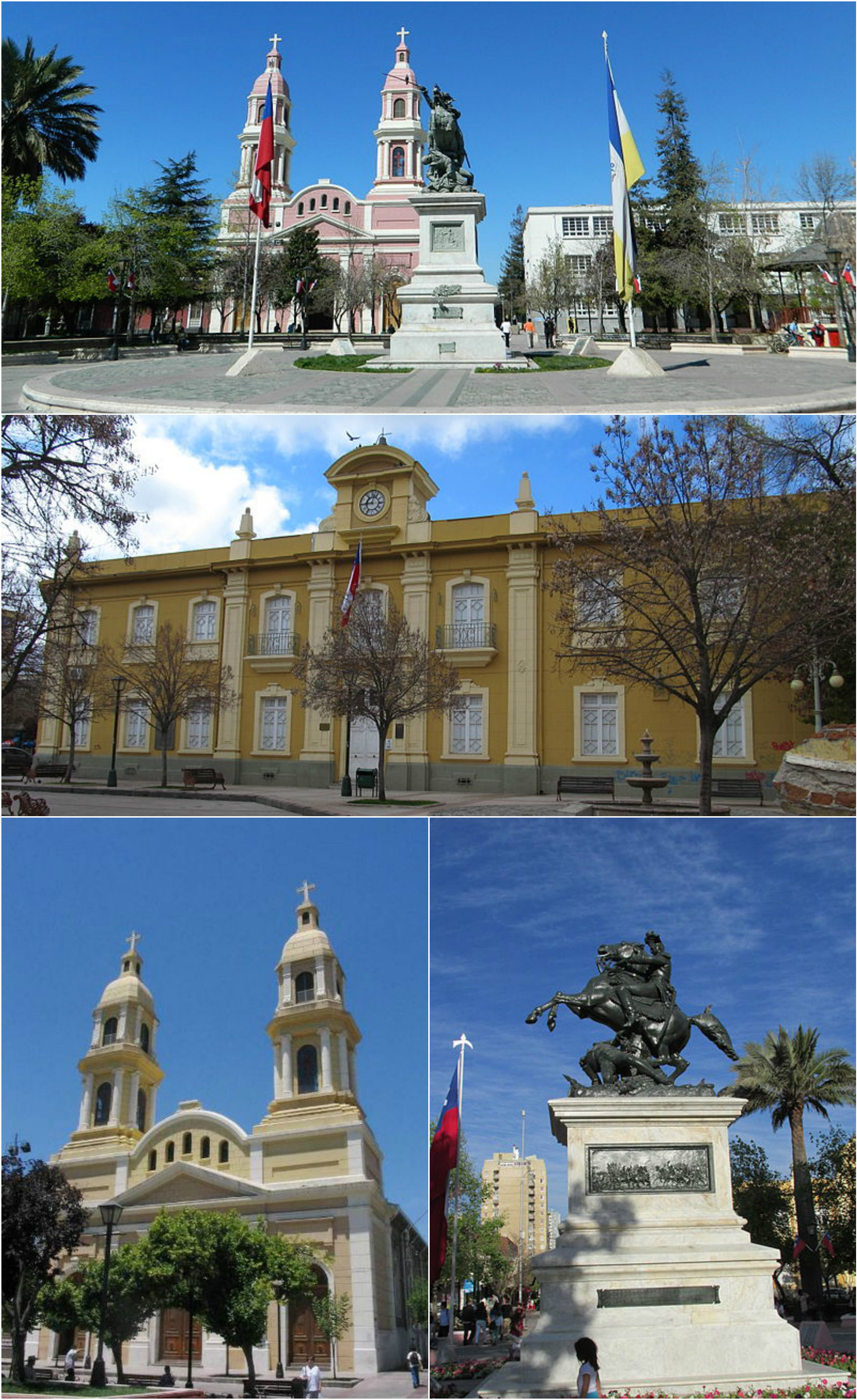 Montaje fotográfico de la ciudad de Rancagua, capital de la Región de O'Higgins, Chile.